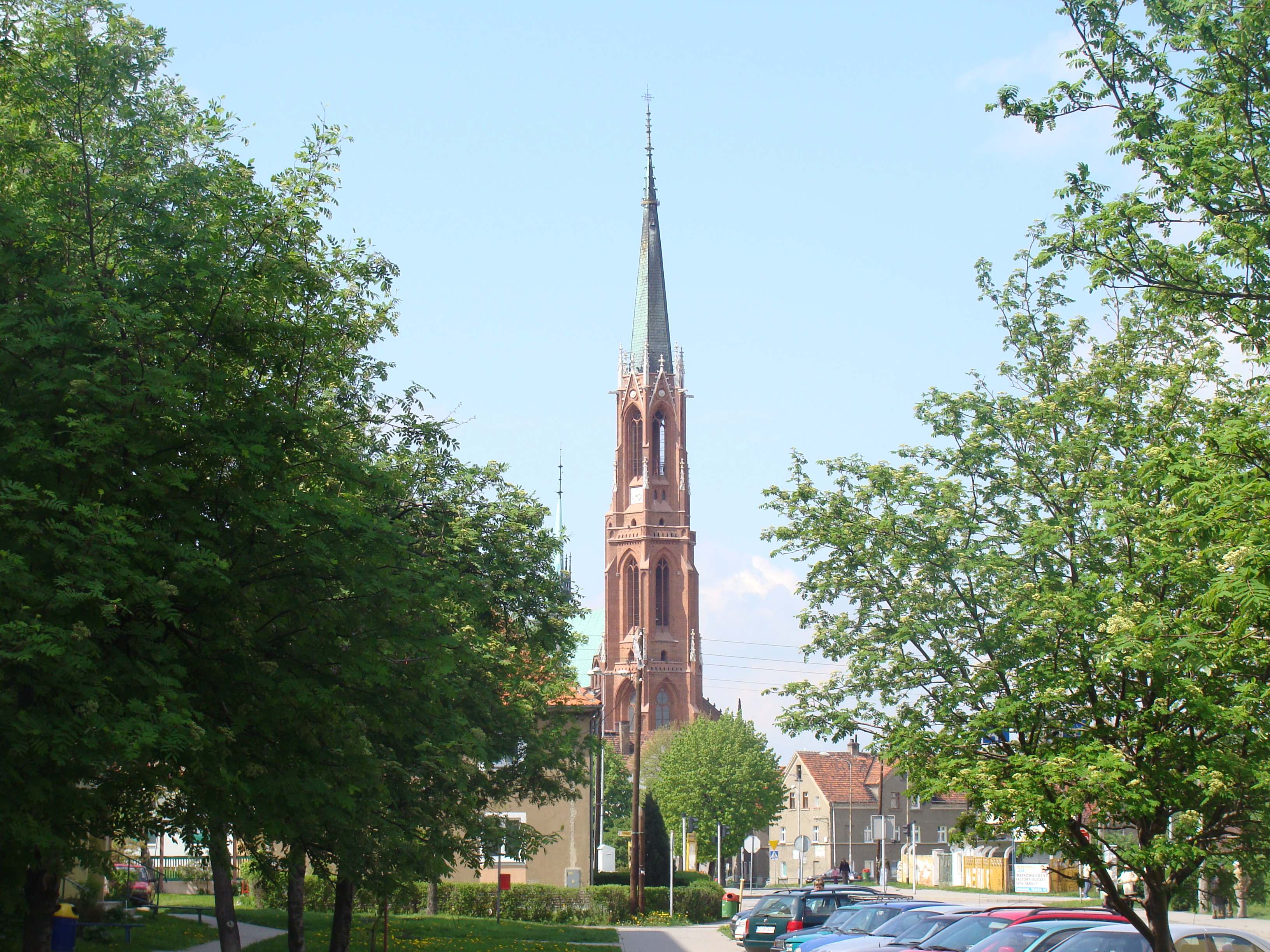 Kościół WNMP w Bielawie